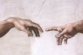 Sistine Chapel, fresco Michelangelo